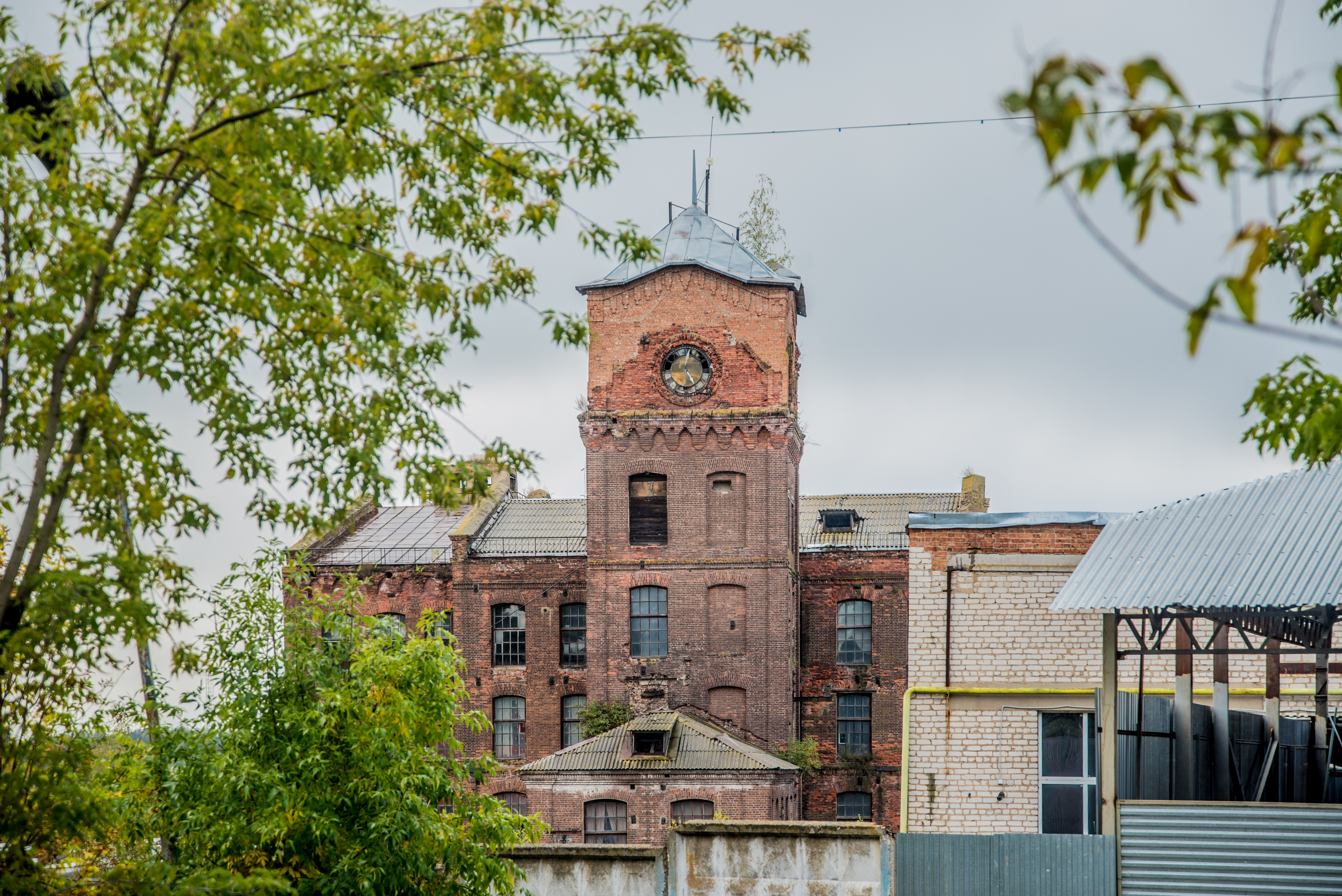 Здание ярцевского х/б комбината — крупнейшего предприятия текстильной промышленности области, награжденного за производственные успехи орденом Ленина: улица Ленинская, 16, хлопчатобум. комбинат, Ярцево, Ярцевский район, Смоленская область